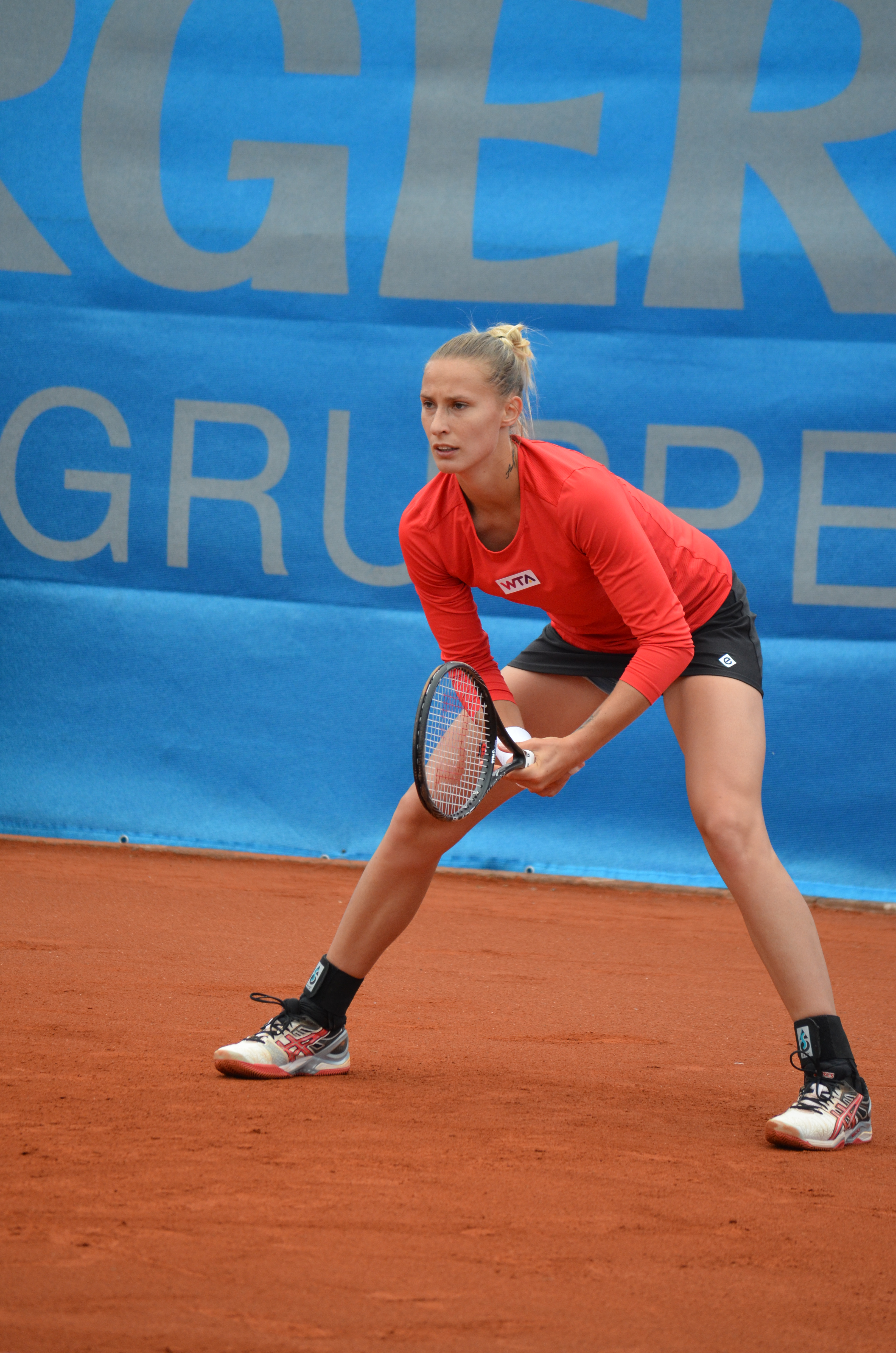 Polona Hercog in der Erstrundenbegegnung der Einzelkonkurrenz beim Nürnberger Versicherungscup 2014 gegen Klára Koukalová